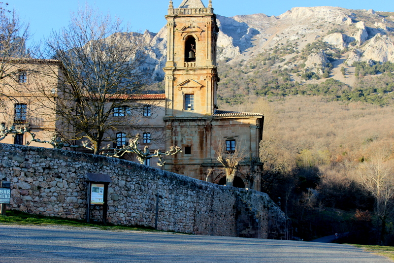 Kodesko santutegia